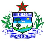 Brasão de Caraúbas-RN, Brasil